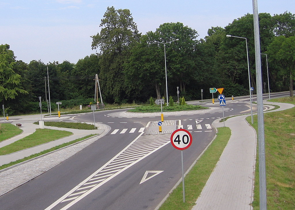 Rondo w mieście Płoty (zachodniopomorskie) na drodze wojewódzkiej 152